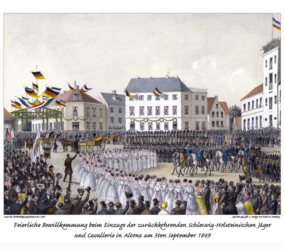 Rückkehr der Schleswig-holsteinischen Jäger und Cavallerie in Altona am 3ten September 1849, gezeichnet von Christoffer Suhr, Litho von Peter Suhr